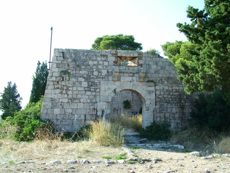 Ruina bramy brytyjskiego fortu st. George na Vis.